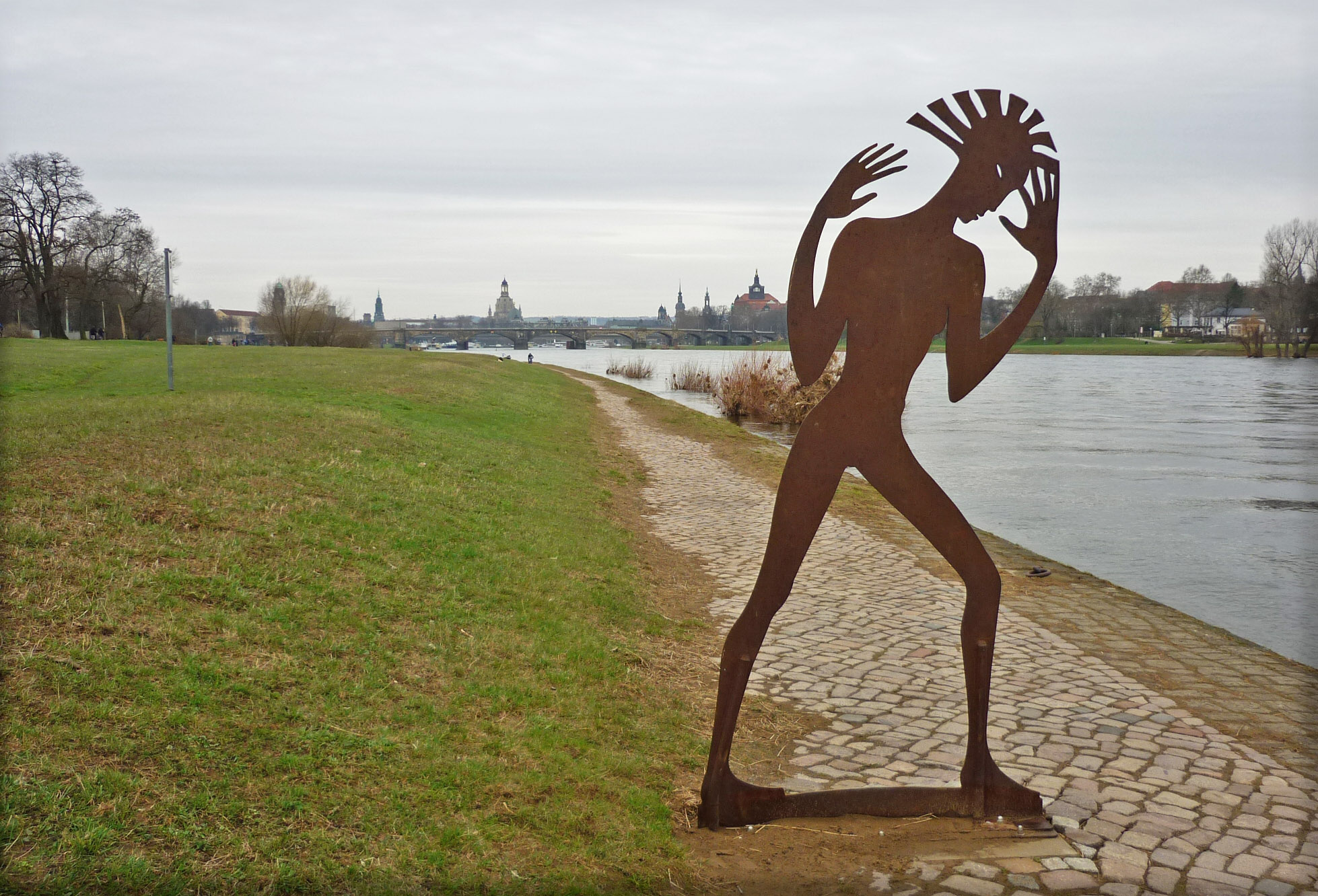 Skulptur "Undine geht" (von Angela Hampel) an der Elbe in Dresden-Johannstadt